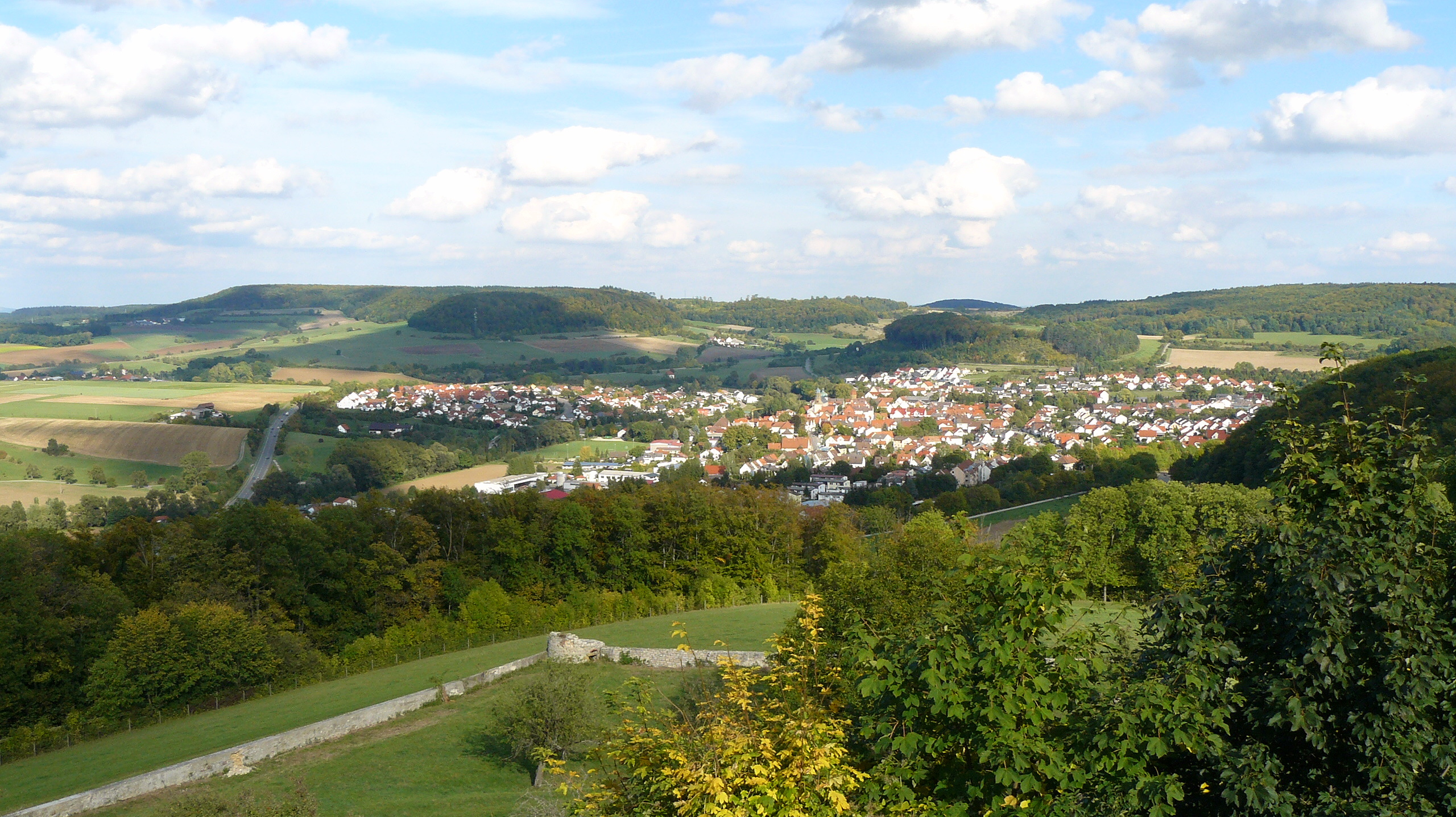 Blick auf Lauchheim von Schloss Kapfenburg